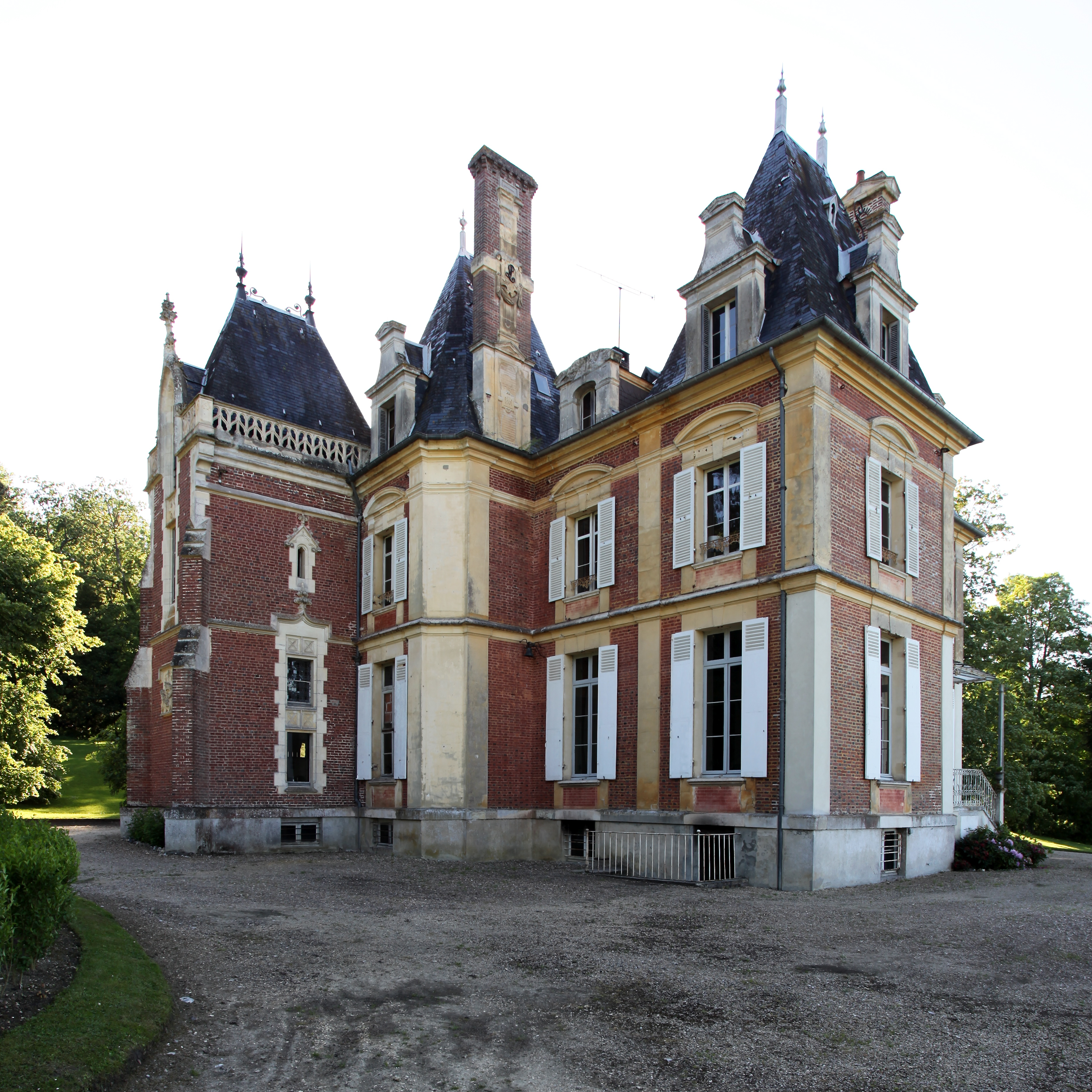 Château de Saint-Martin du Mesnil-Oury, Calvados, France